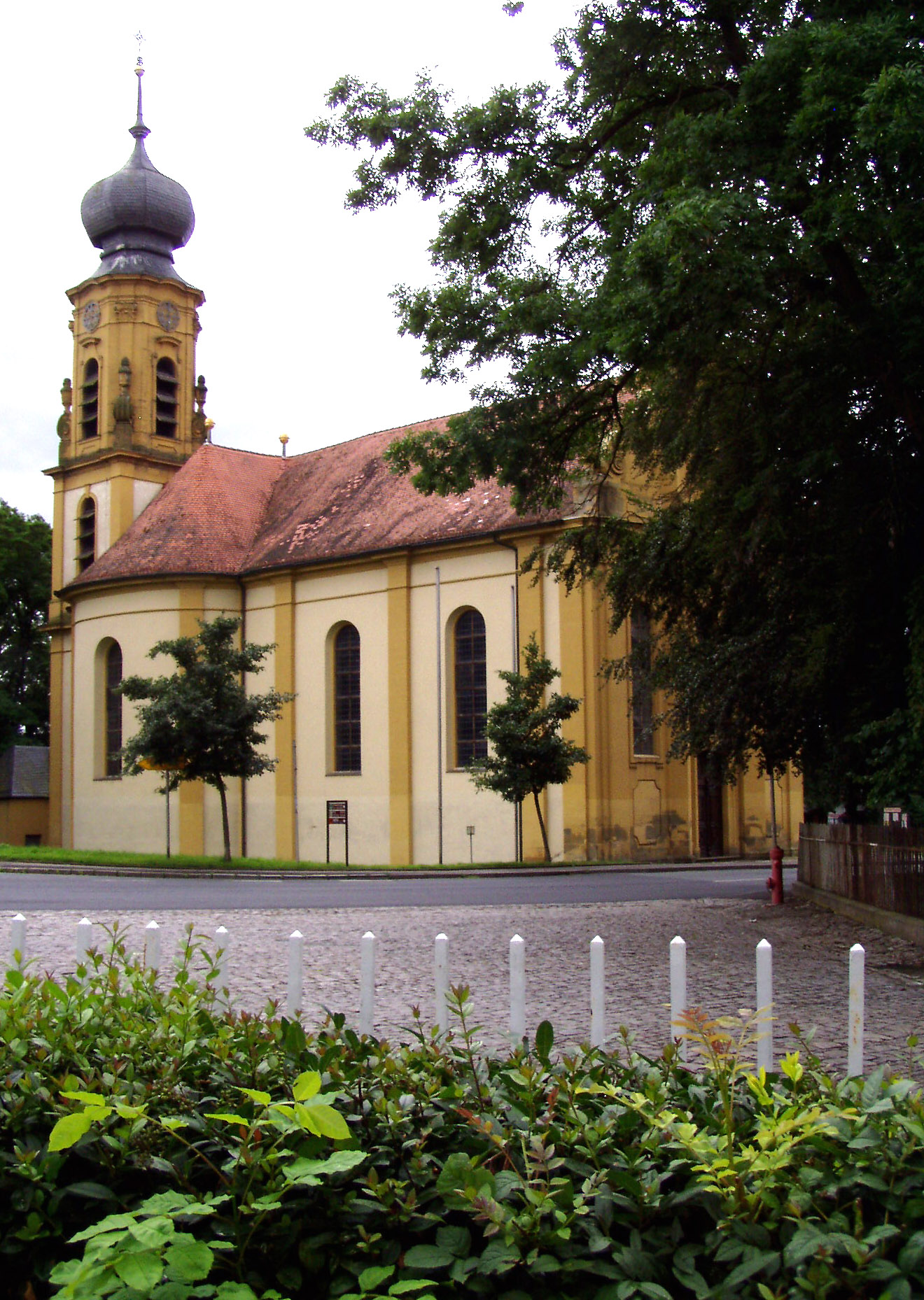 Balthasar Neumanns Pfarrkirche 'Zur heiligsten Dreifaltigkeit' in Gaibach